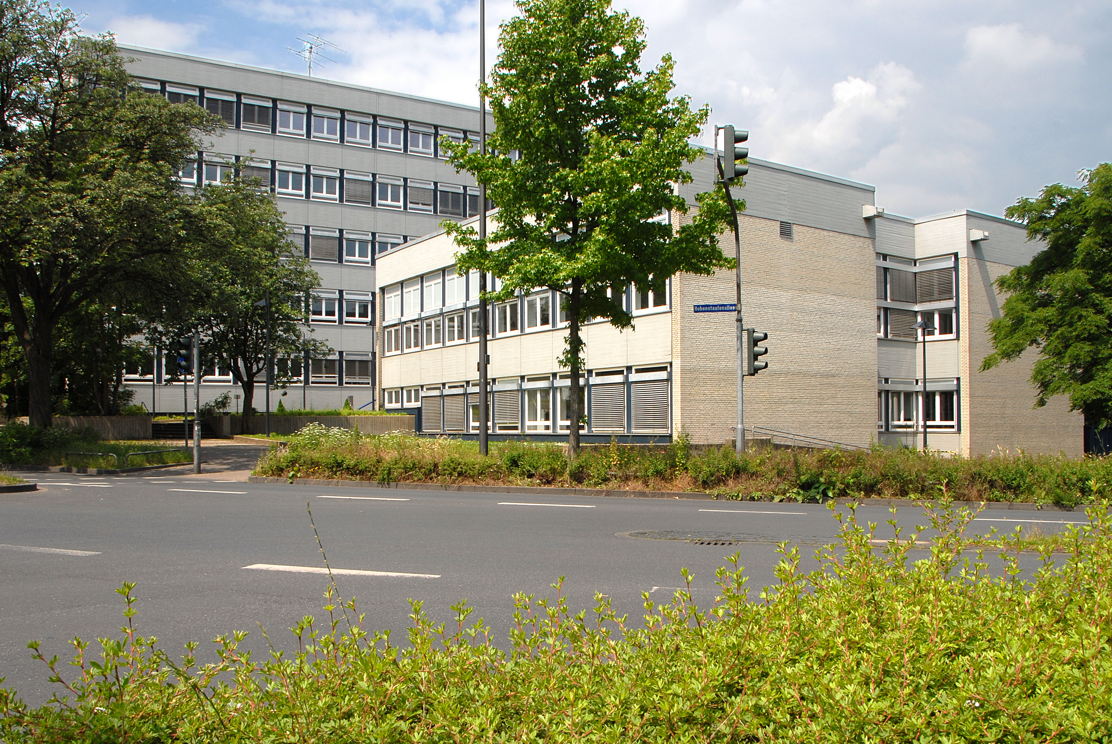 Gebäude der FH Aachen in der Hohenstaufenallee